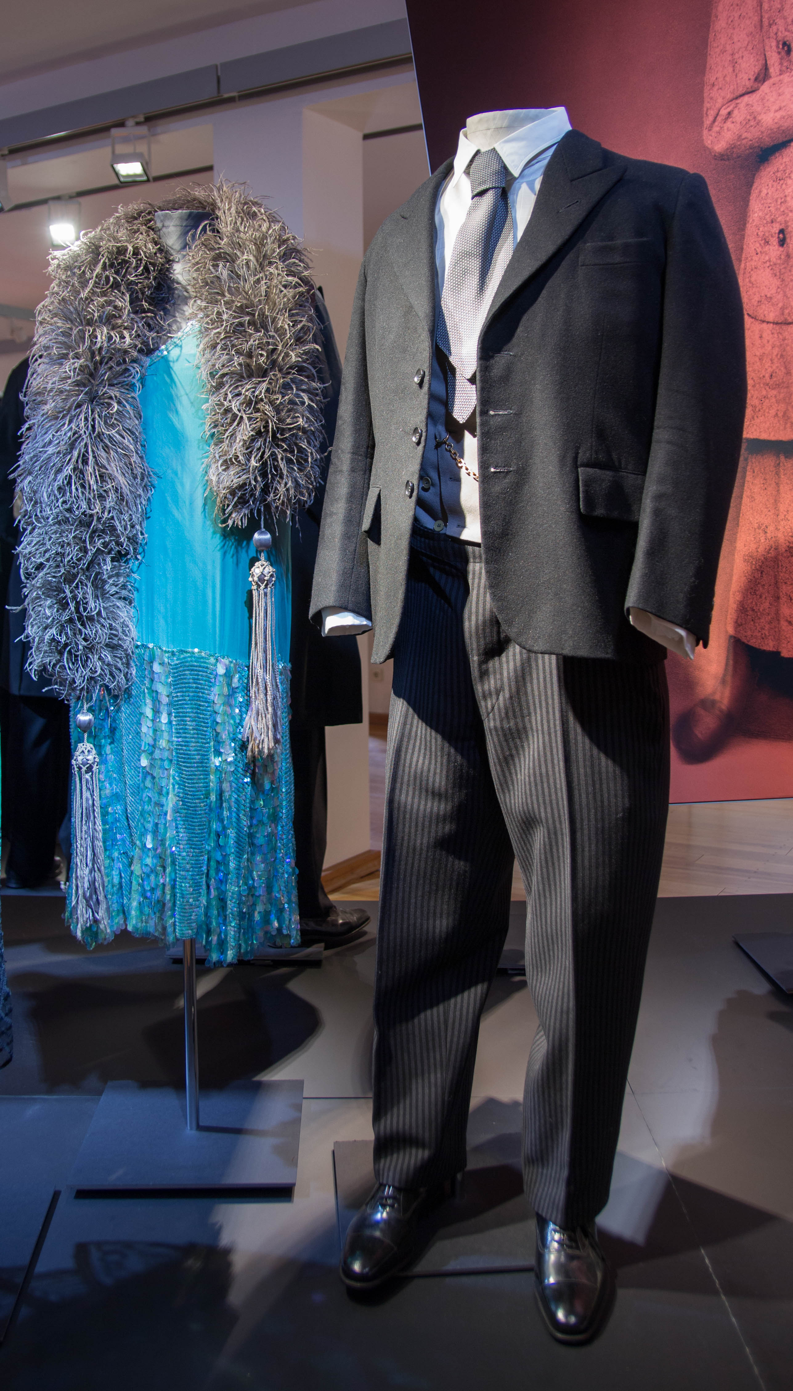 "Stresemann", ein Kleidungsstück aus den 1920er-Jahren. Aus der Ausstellung "Macht der Mode" in der Textilfabrik Cromford, Ratingen.